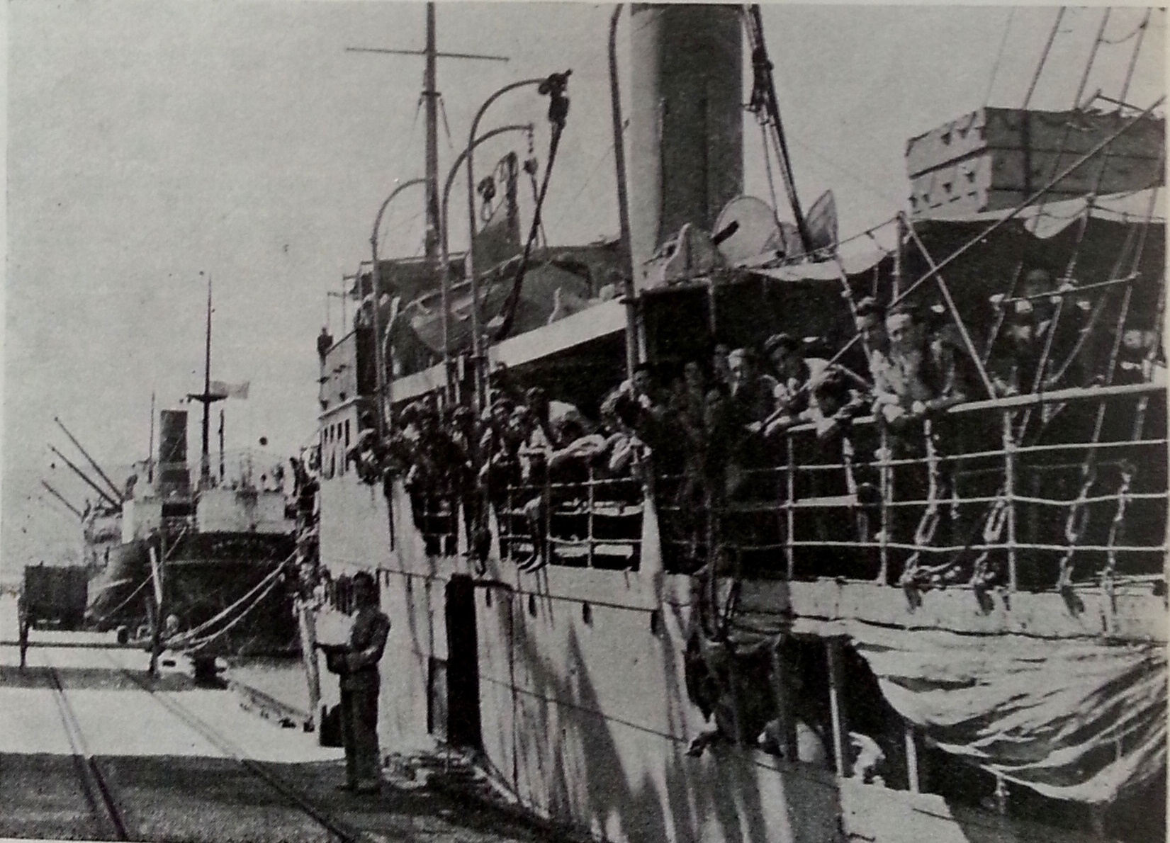 קולרדו אונית מעפילים עצורה בנמל חיפה